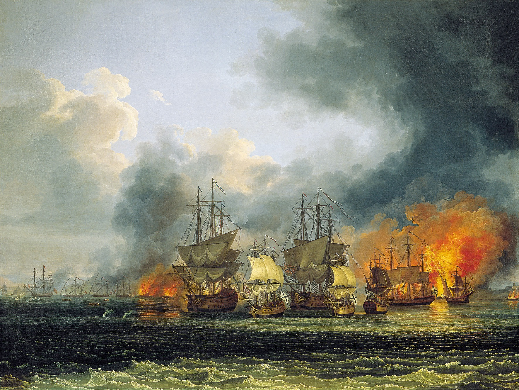 Это картина немецкого художника Якоба Филиппа Гаккерта «Сражение у города Патрас». Картина написана специально для Чесменского зала Большого Петергофского дворца в 1778 году. На картине описаны события морского сражения при Патрасе 9 ноября 1772 года. В центре картины - 5 кораблей русской эскадры с раздутыми парусами, справа - линейный корабль «граф Орлов». На дальнем плане за русскими судами зарево пожара - горящий флот Мустафы паши. У левого края картины несколько мелких турецких судов, устремившихся в Коринфский залив, к ним подплывают русские шлюпки. Картина украшает Чесменский зал Большого Петергофского дворца